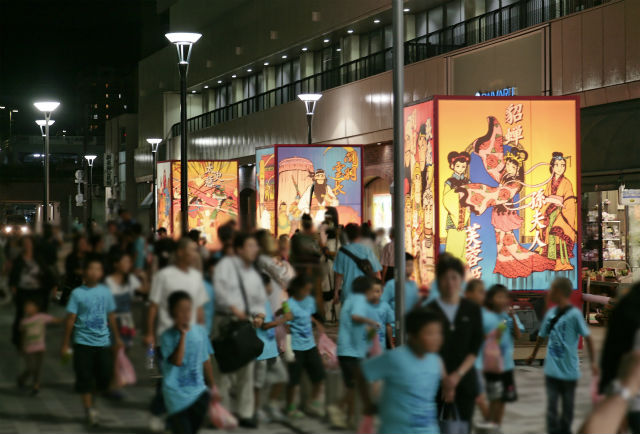 三国志祭 新長田にて